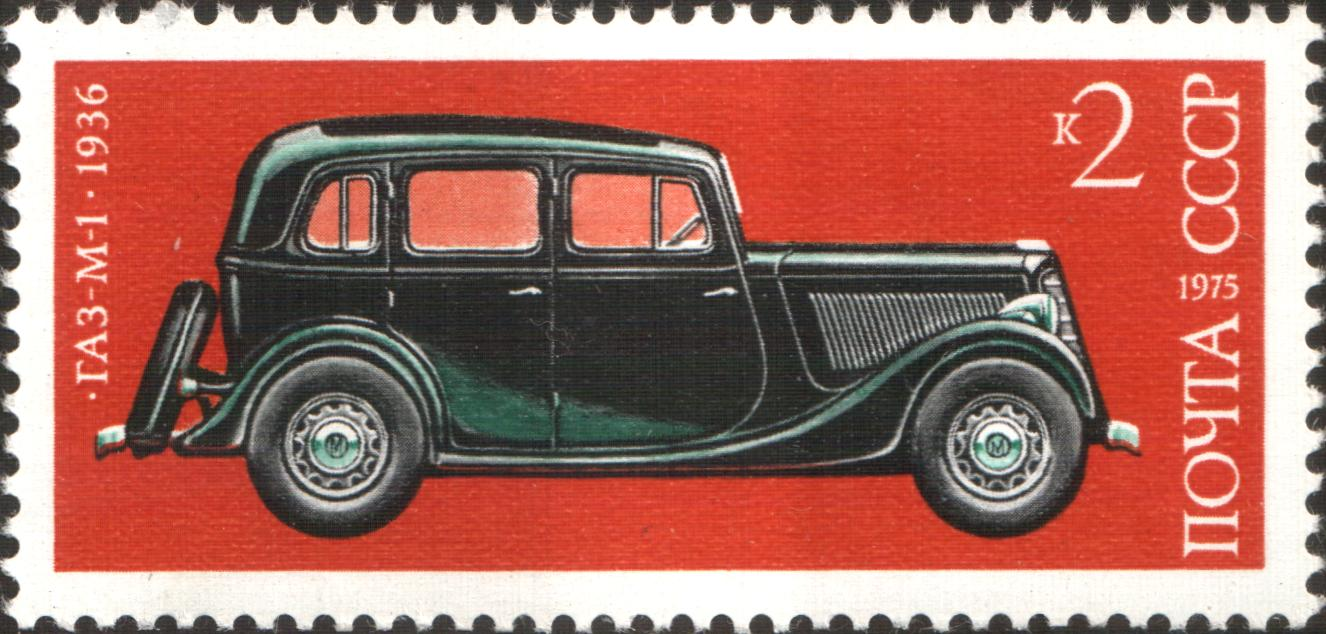 Briefmarke, Sowjetunion